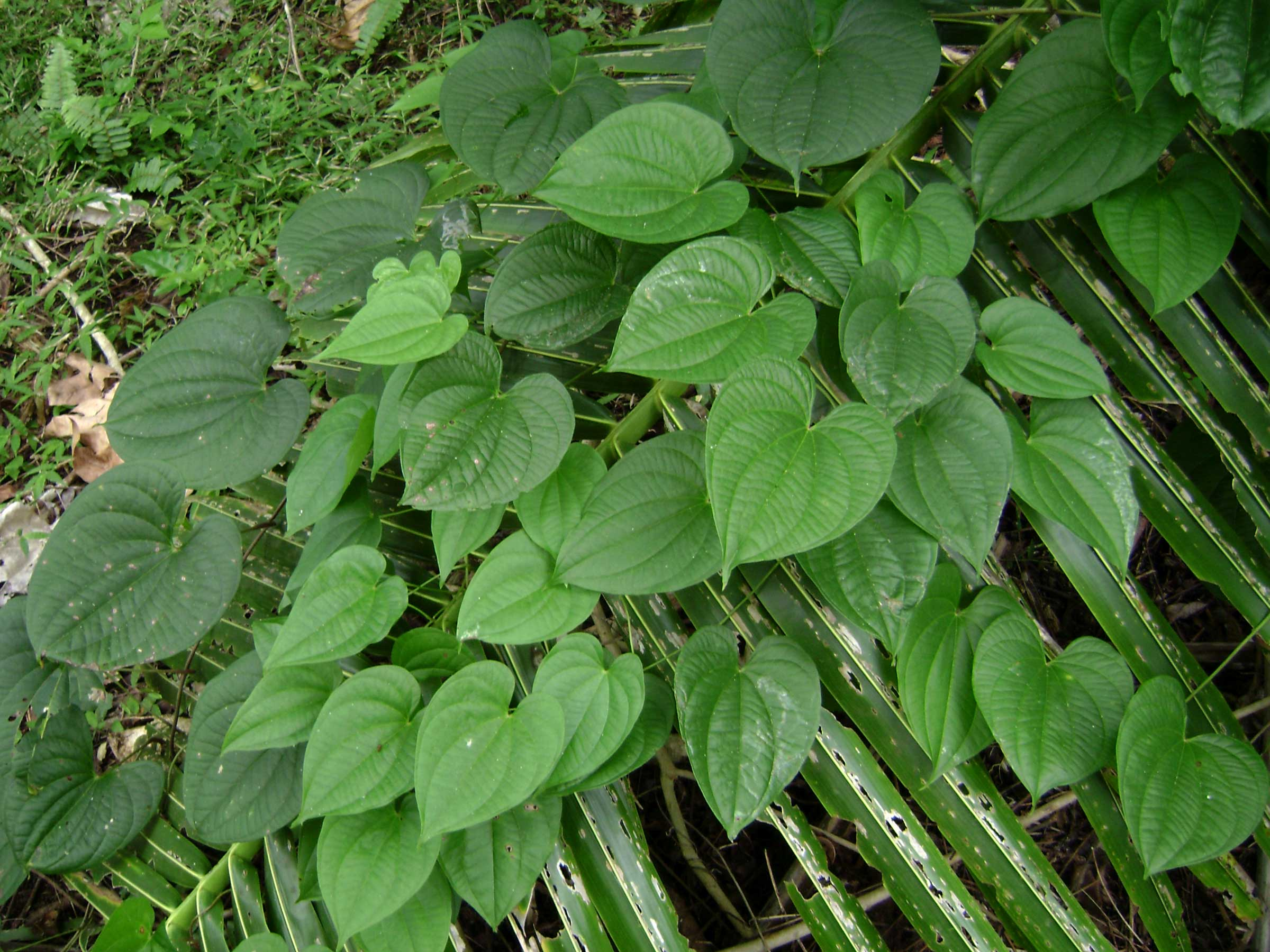 Dioscorea alata, climbing up along a coconut leaf; (ʻufi), Vavaʻu, Tonga